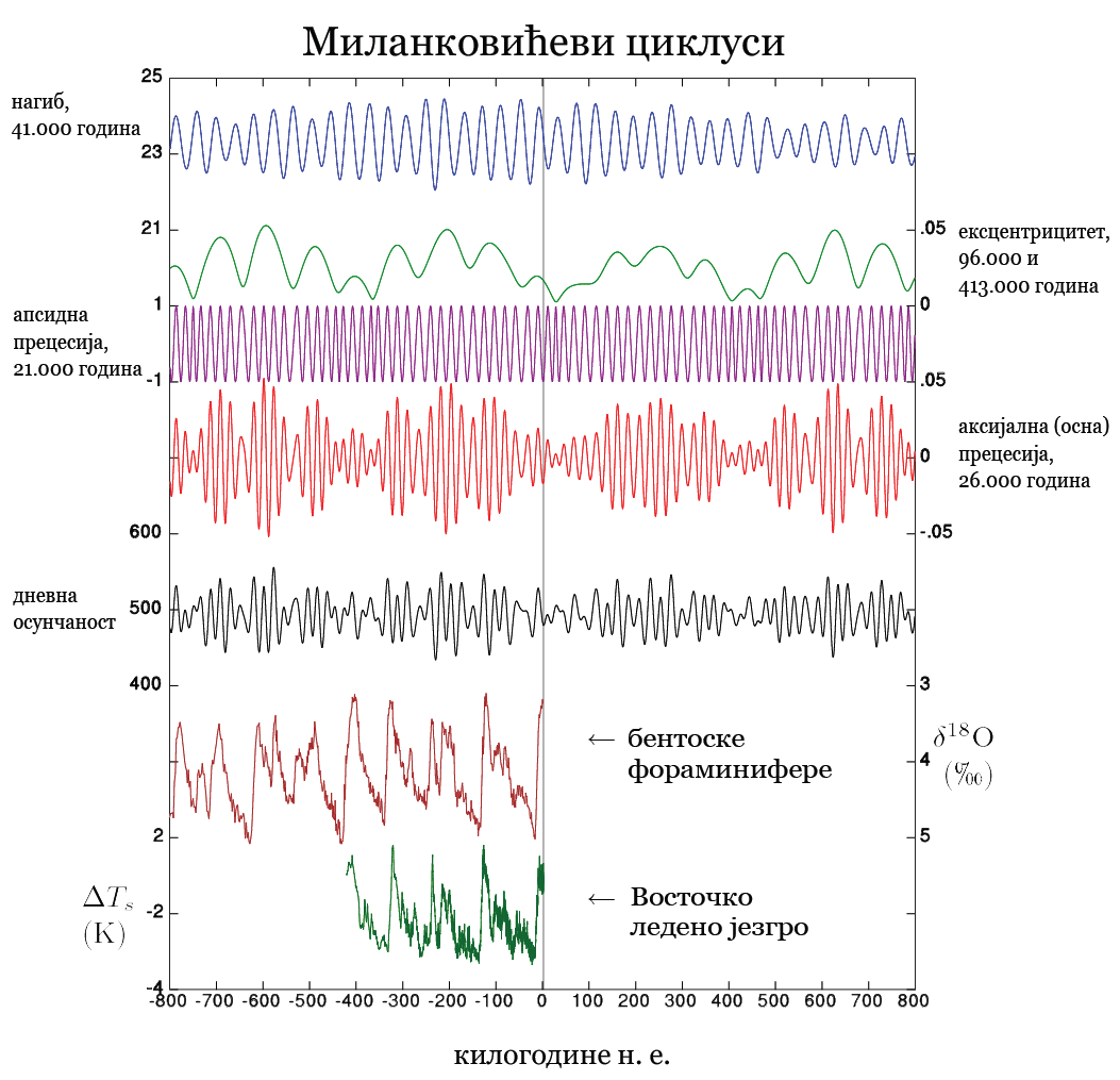 Верзија претходне слике с описом